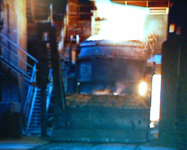 The Société Métallurgique de Normandie steel plant, Caen.